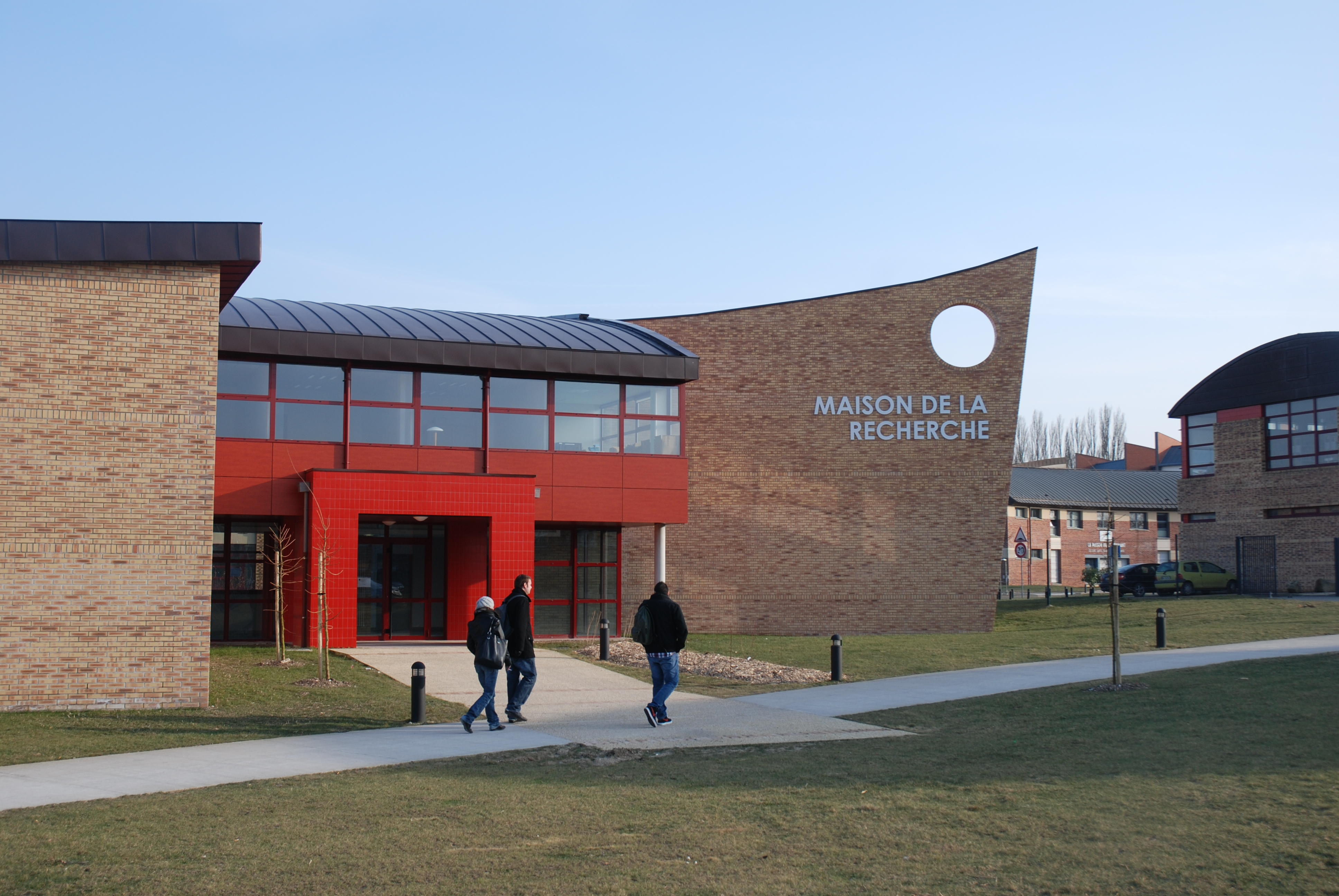 Le bâtiment de la Maison de la Recherche à Arras